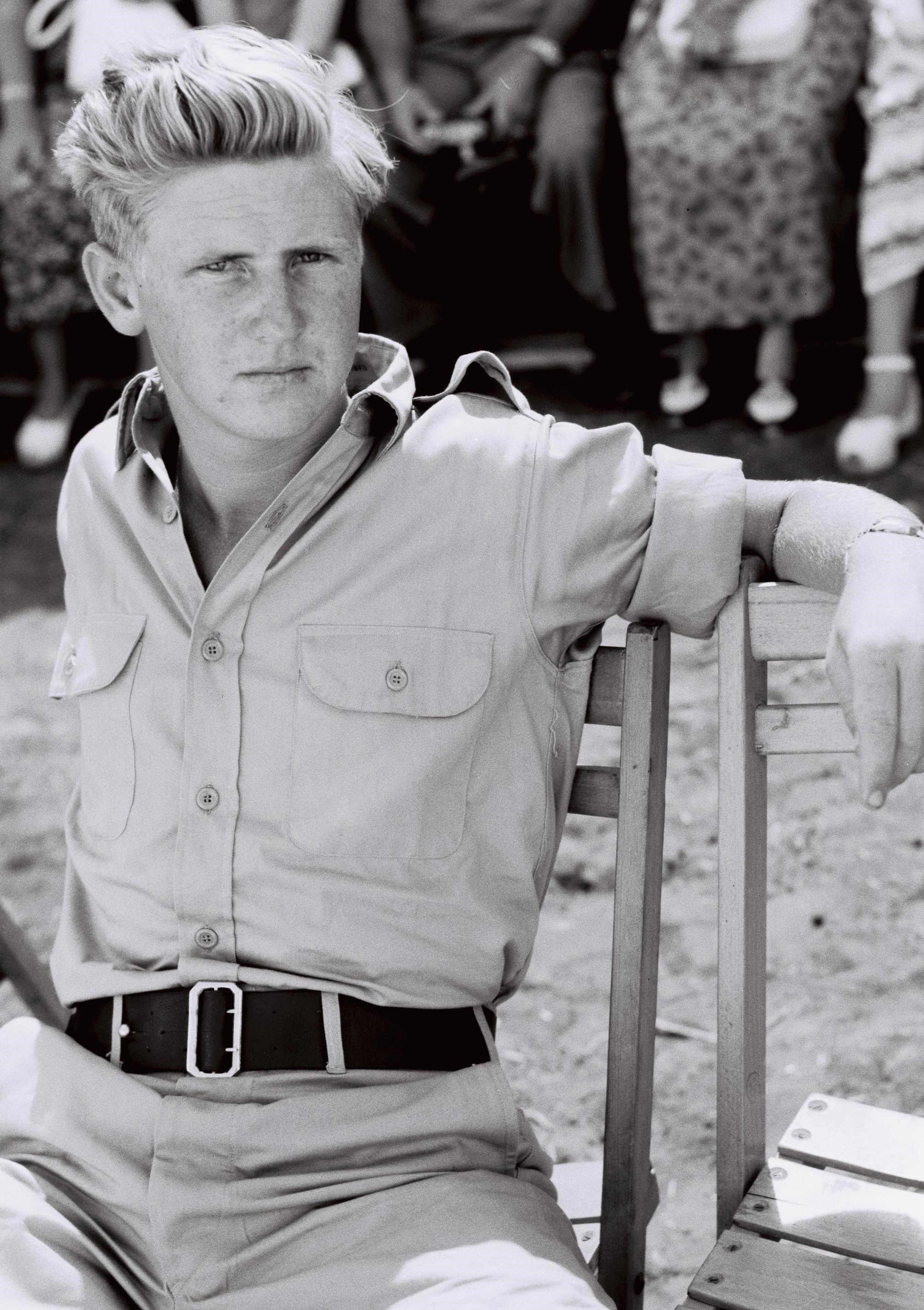 Avraham Avigdorov